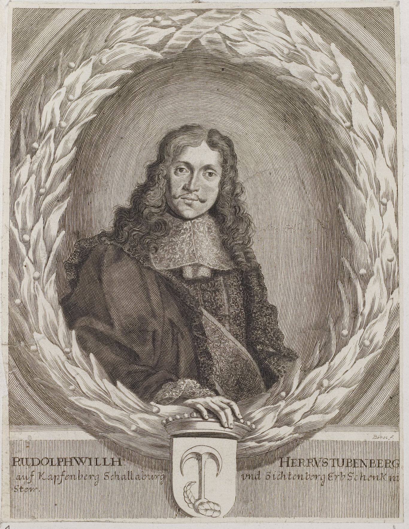 Grafik aus dem Klebeband Nr. 2 der Fürstlich Waldeckschen Hofbibliothek Arolsen Motiv: Rudolf Wilhelm von Stubenberg